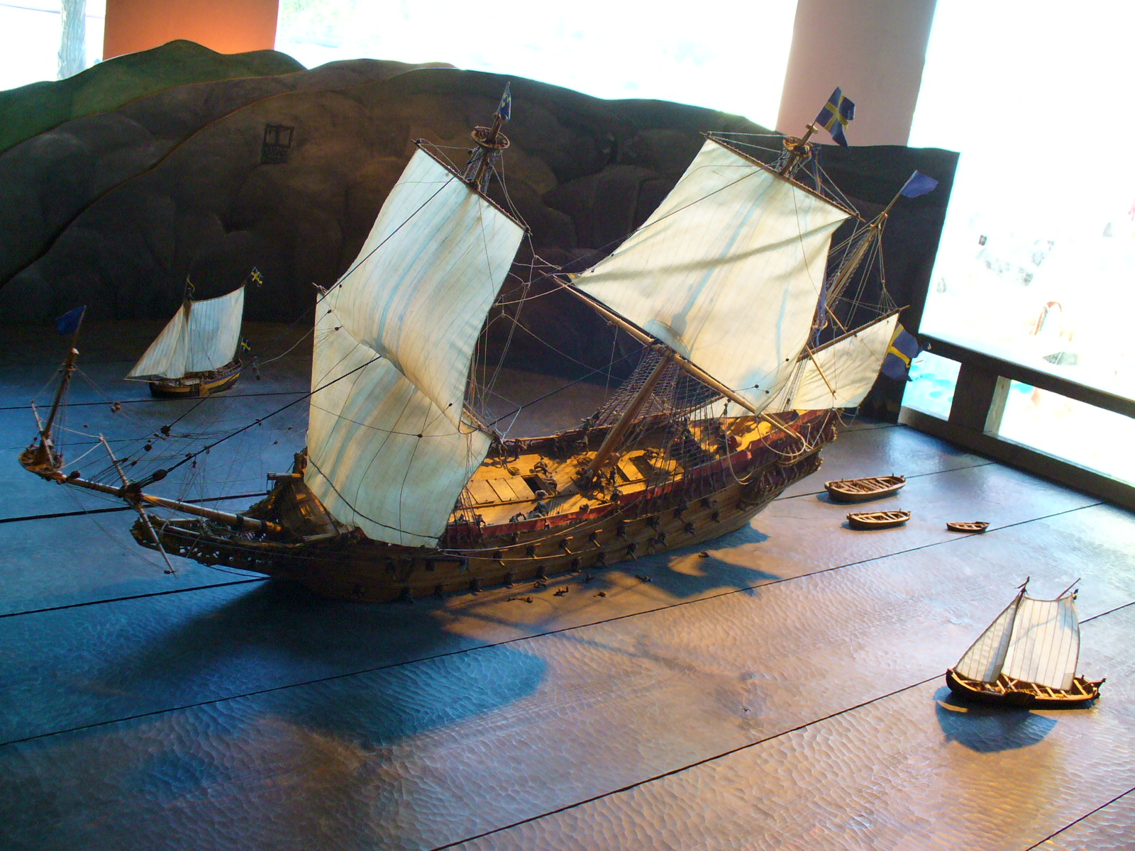 Makett a vasa hajo elsullyedeserol. Vasa muzeum, Stockholm. Sajat digitalis kamera. --Math 2005. oktÃ³ber 18., 17:55 (CEST) hivatkozando forras: Brendel Matyas